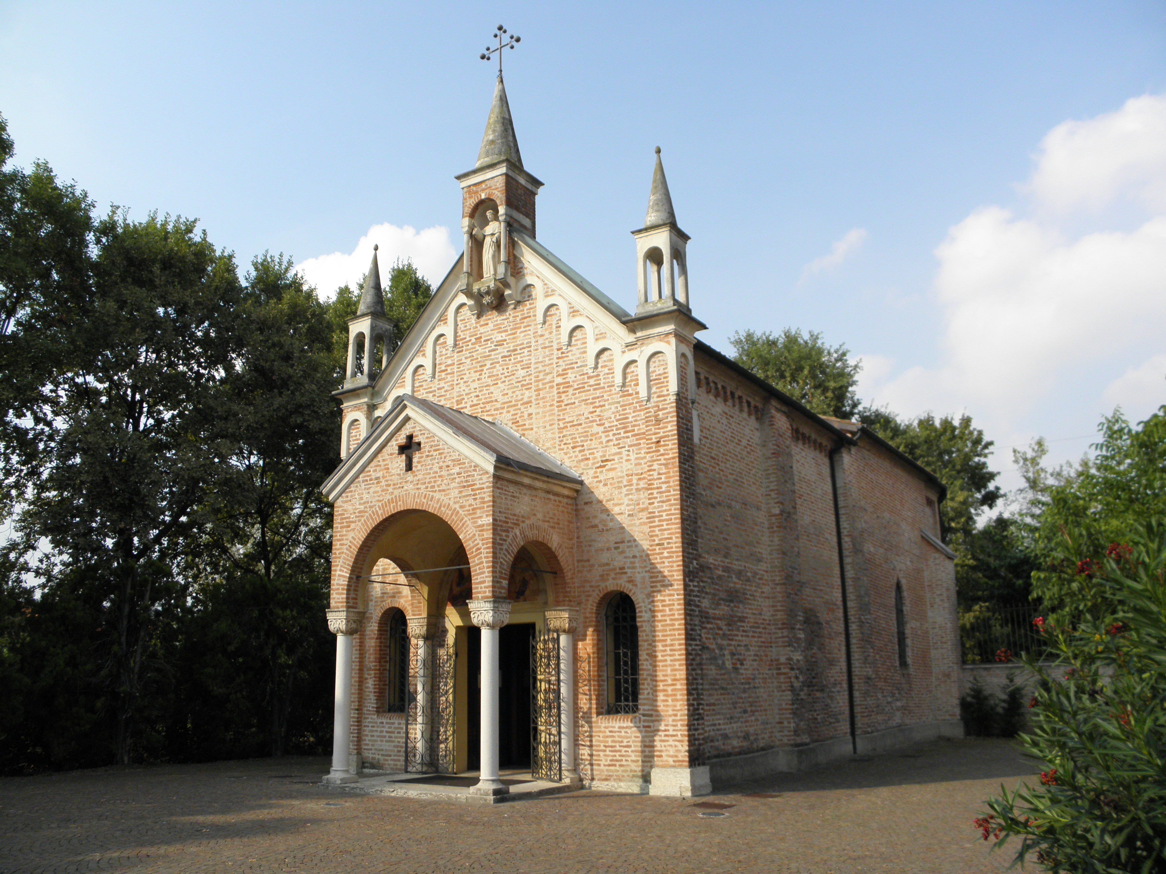 Camposampiero, il Santuario del noce, detto anche oratorio di Sant'Antonio. This is a photo of a monument which is part of cultural heritage of Italy.